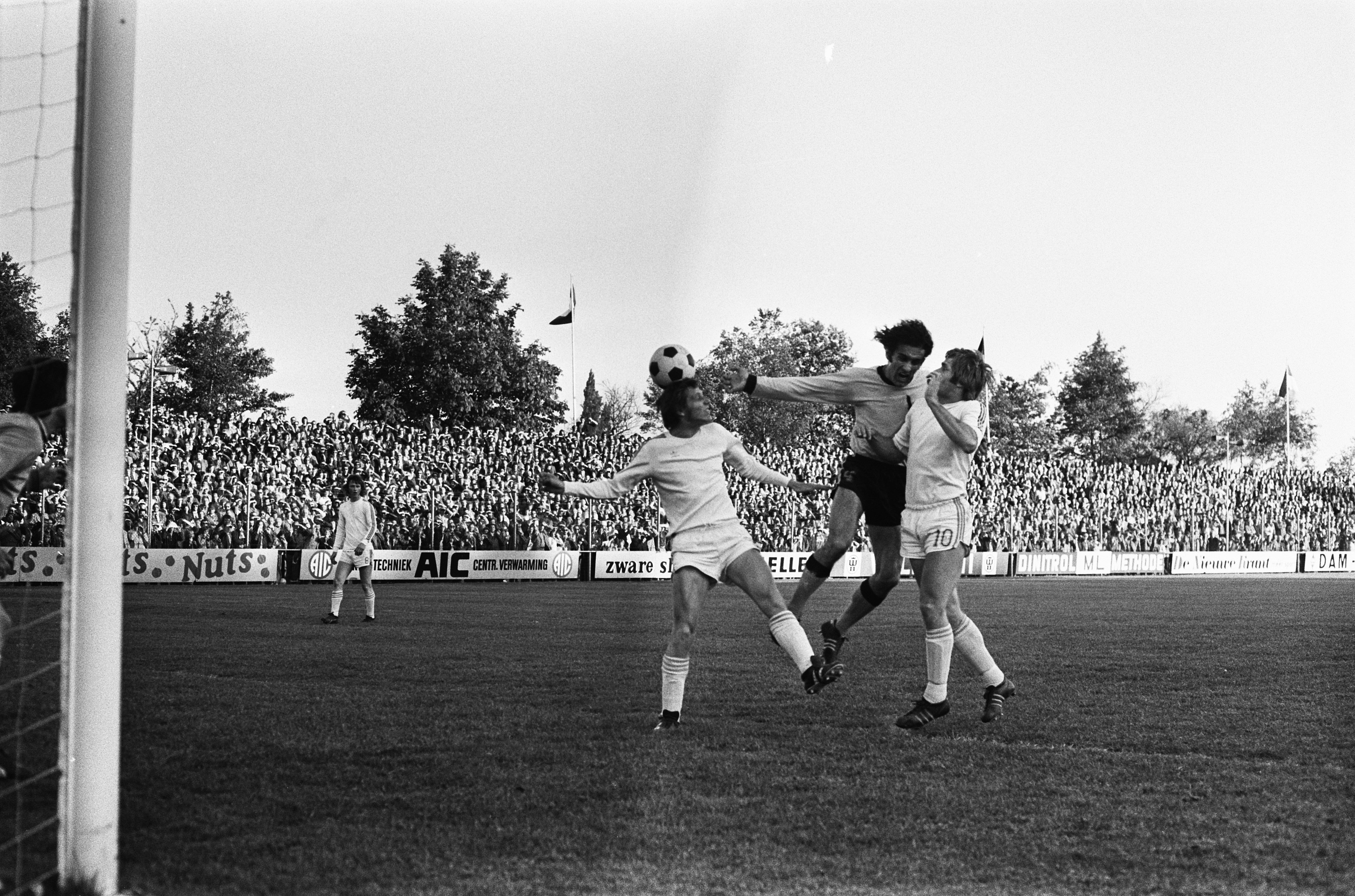 Collectie / Archief : Fotocollectie Anefo Reportage / Serie : Vitesse-FC Groningen 1-0 Beschrijving : Bursac (Vitesse) tussen twee verdedigers van FC Groningen Datum : 19 mei 1975 Locatie : Arnhem Trefwoorden : sport, voetbal Persoonsnaam : Bursac, Bosco Fotograaf : Fotograaf Onbekend / Anefo Auteursrechthebbende : Nationaal Archief Materiaalsoort : Negatief (zwart/wit) Nummer archiefinventaris : bekijk toegang 2.24.01.05 Bestanddeelnummer : 927-9354